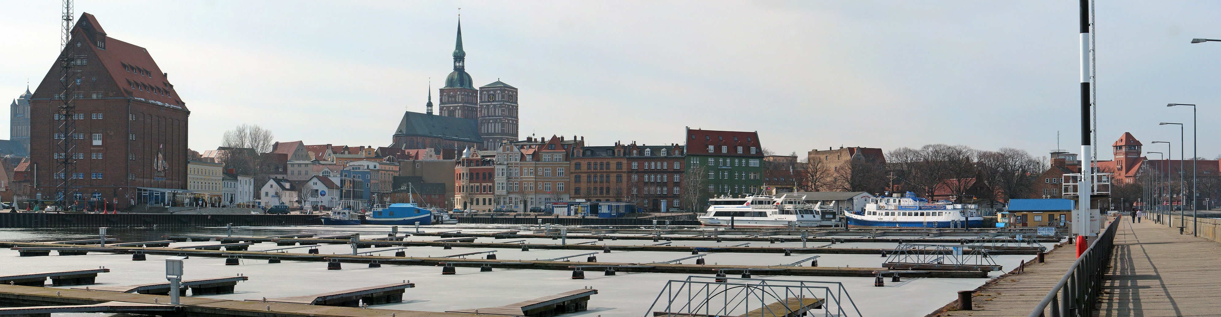 Dieses Bild zeigt den vereisten Hafen von Stralsund.